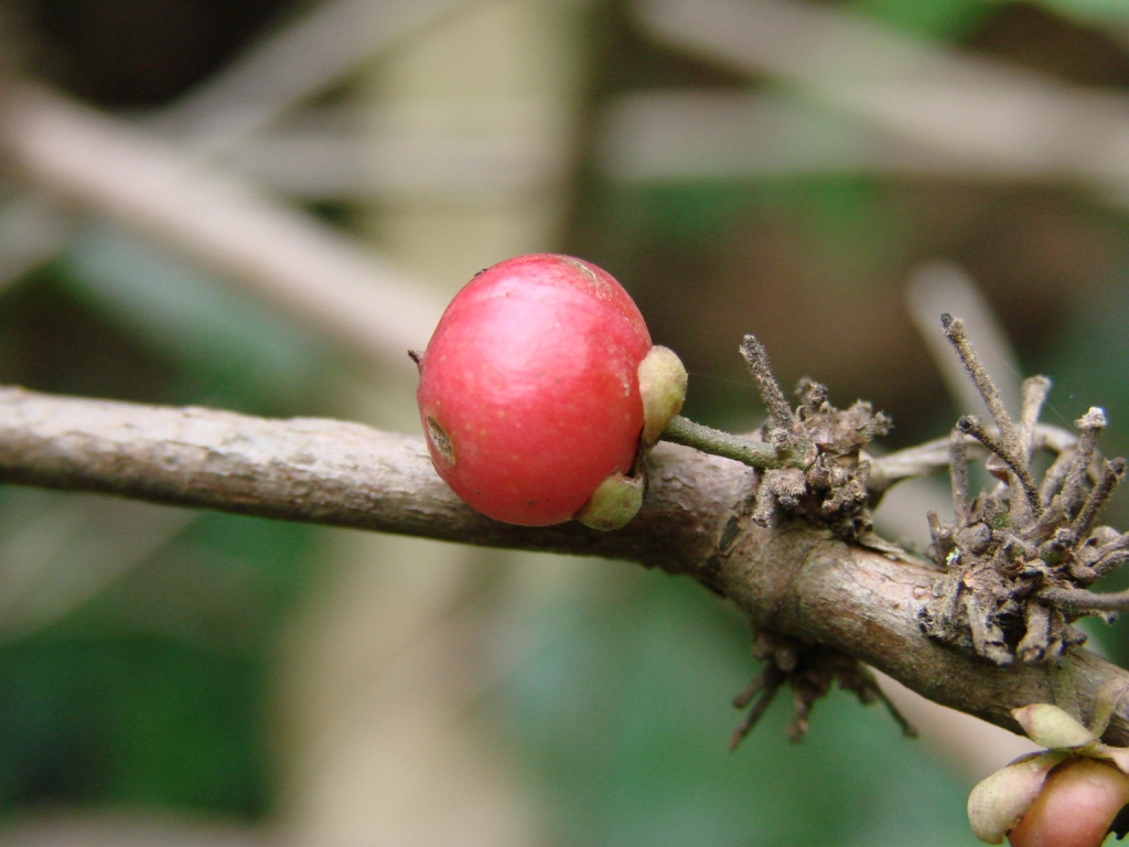 Doliocarpus brevipedicellatus Garcke - DILLENIACEAE - Parque Ecológico dos Jequitibás - Sobradinho - Distrito Federal - Brasil.